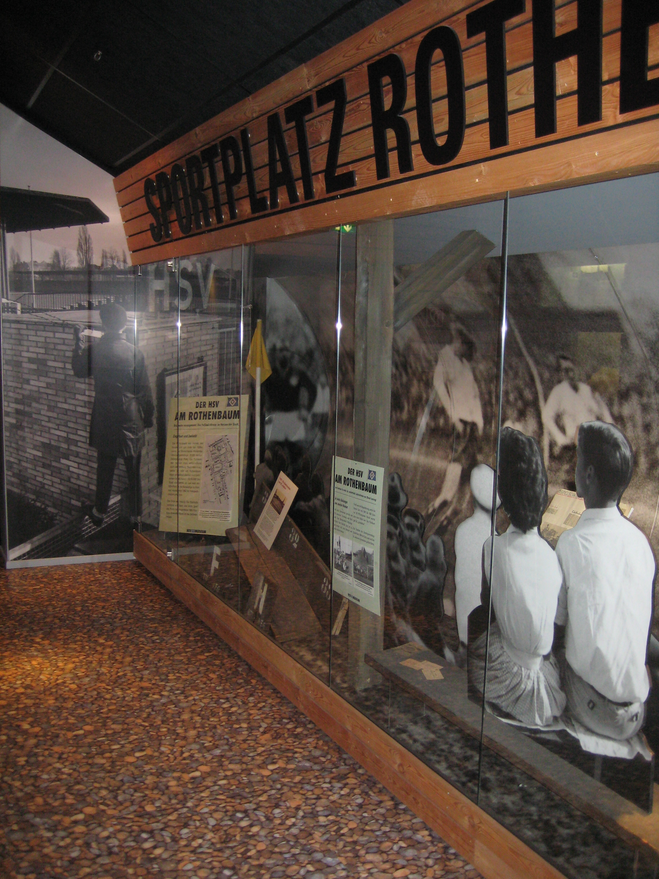 Foto aus der Ausstellung des HSv Museums, Bild ist ohne Genehmigung nicht zur Benutzung durch andere Personen freigegeben.